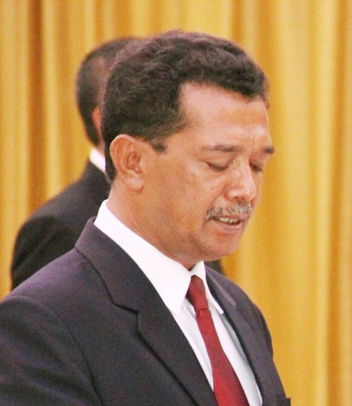 Francisco Tilman Cepeda, osttimoresischer Botschafter in Brüssel erhält seine Akkreditierung